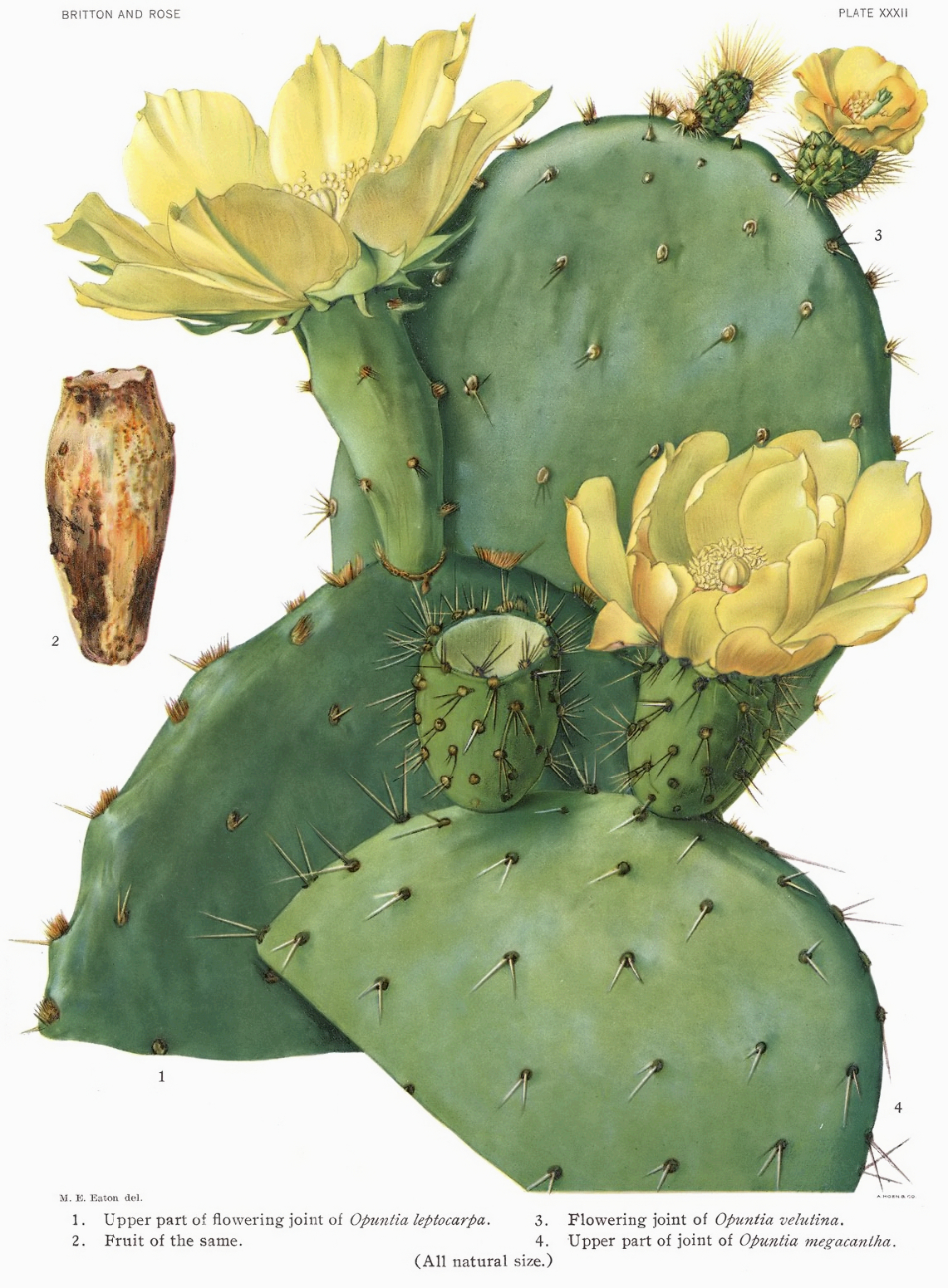 1,2. ?, 3. Opuntia velutina, 4. Opuntia megacantha.